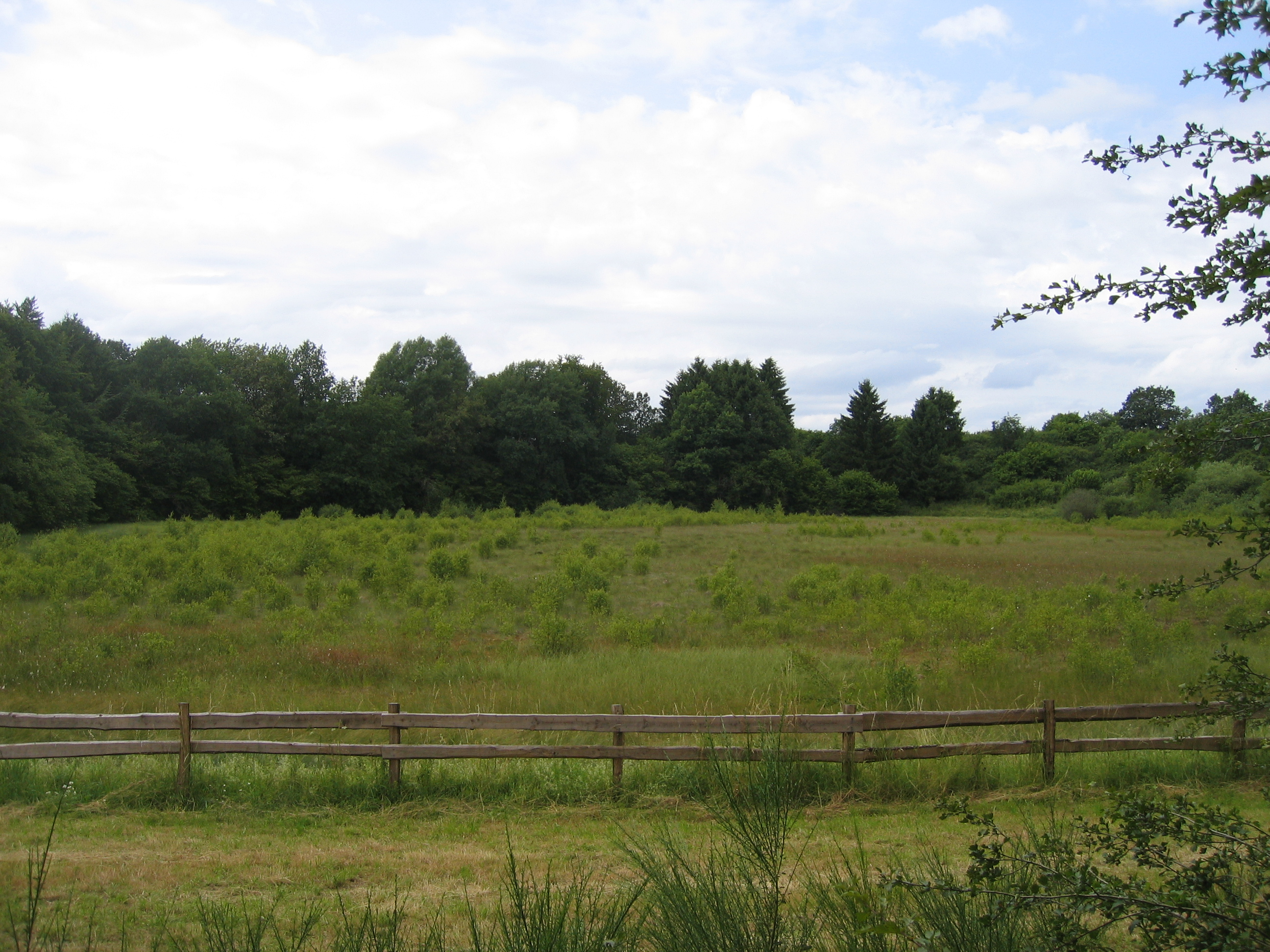 Das Dürre Maar in der Vulkaneifel